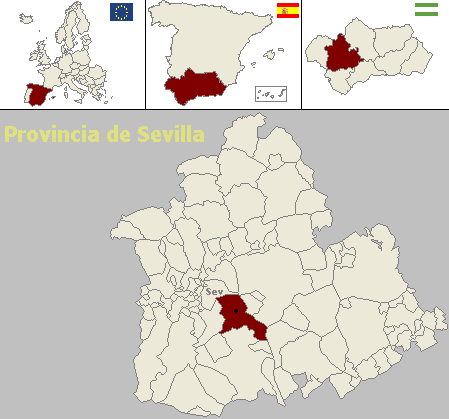 Situación del municipio de Alcalá de Guadaíra (Sevilla, España)Situation de la commune d'Alcalá de Guadaíra (Séville, Espagne)